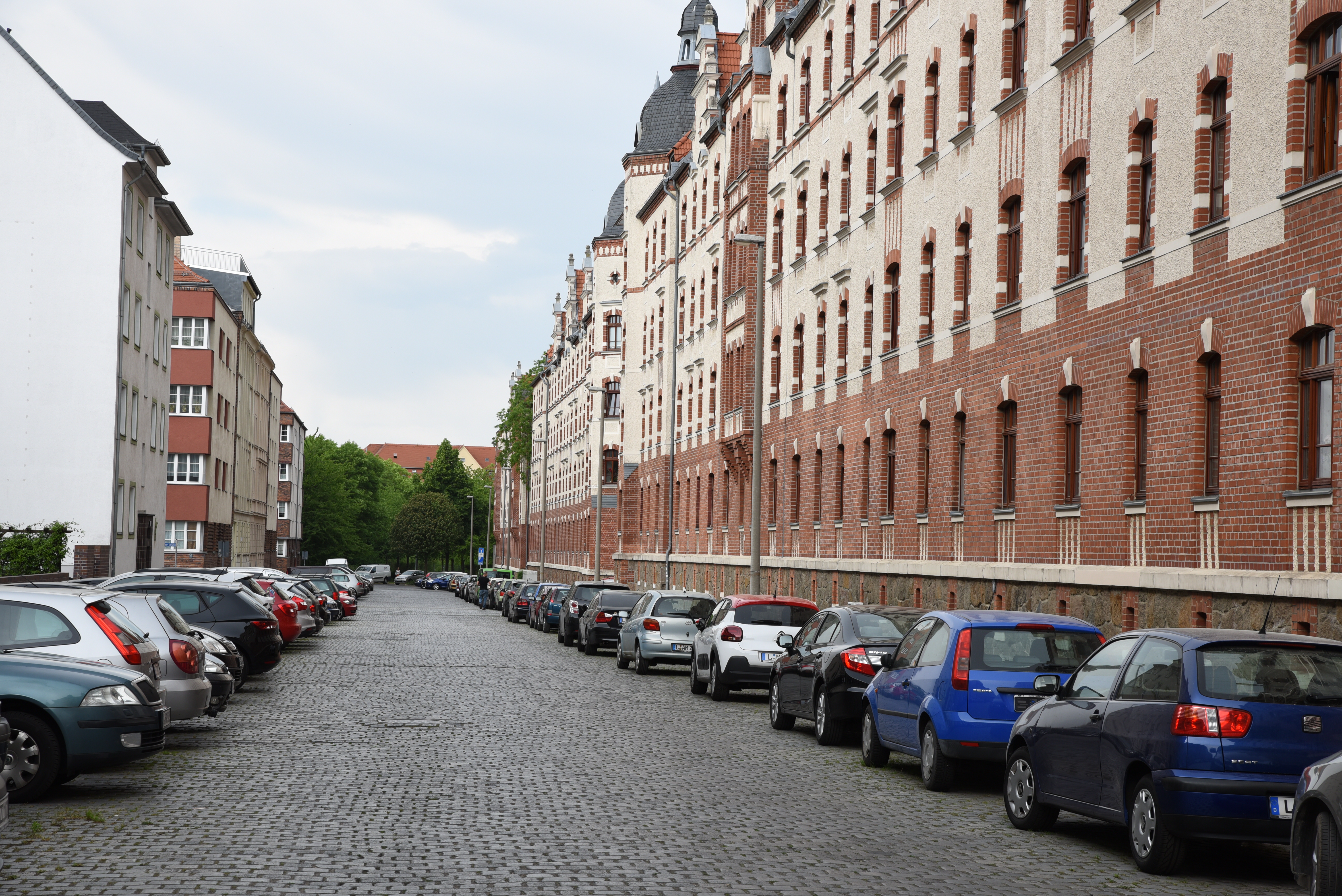 Die Wohnanlage in Reudnitz